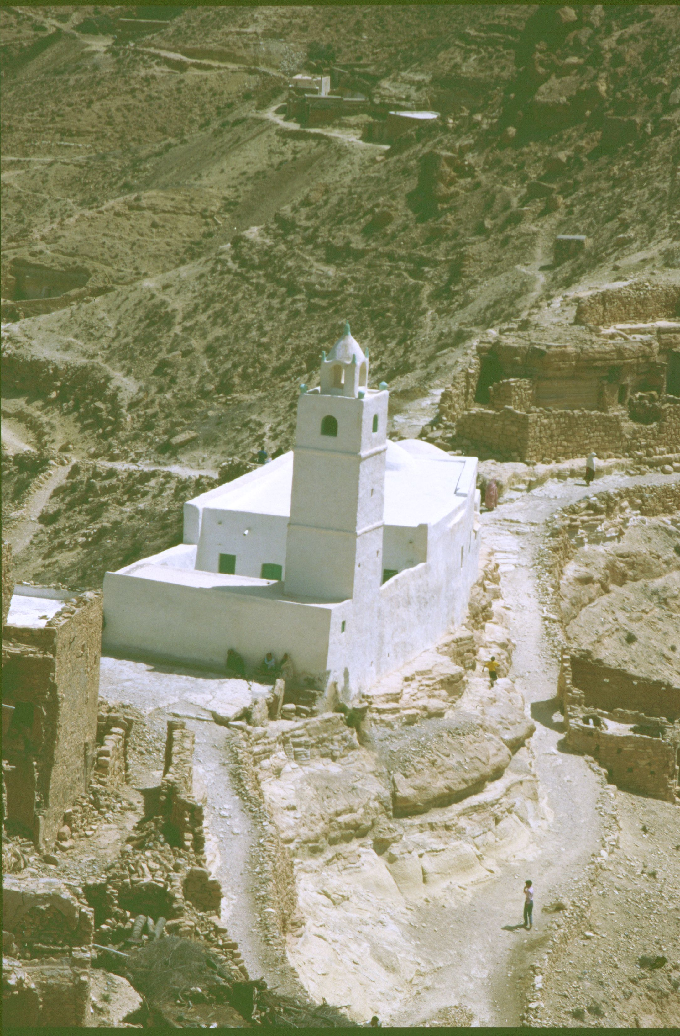 Moschee im Ksar Chenini